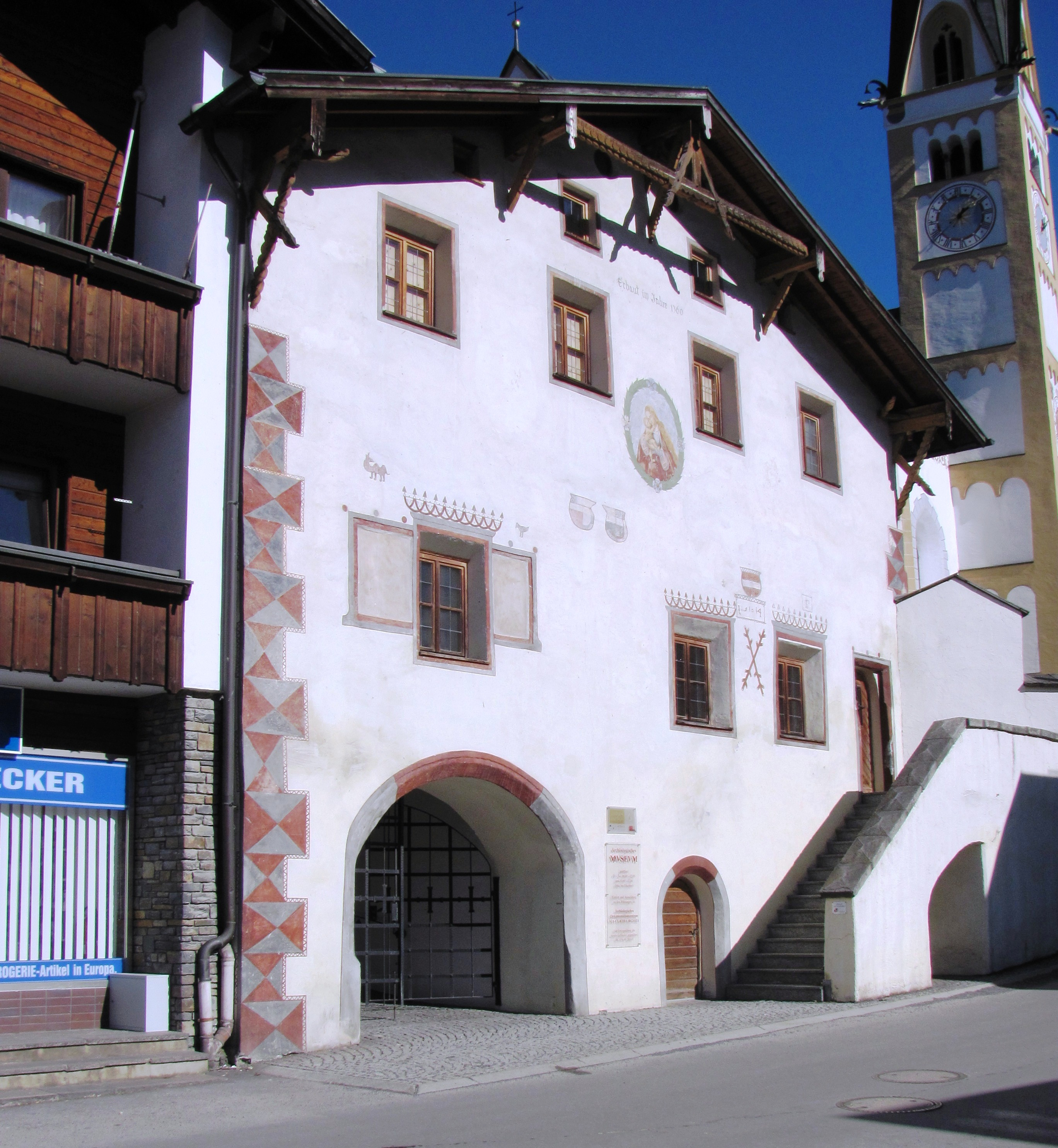 Ehemaliger Widum, Archäologisches Museum, Gemeinde Fliess